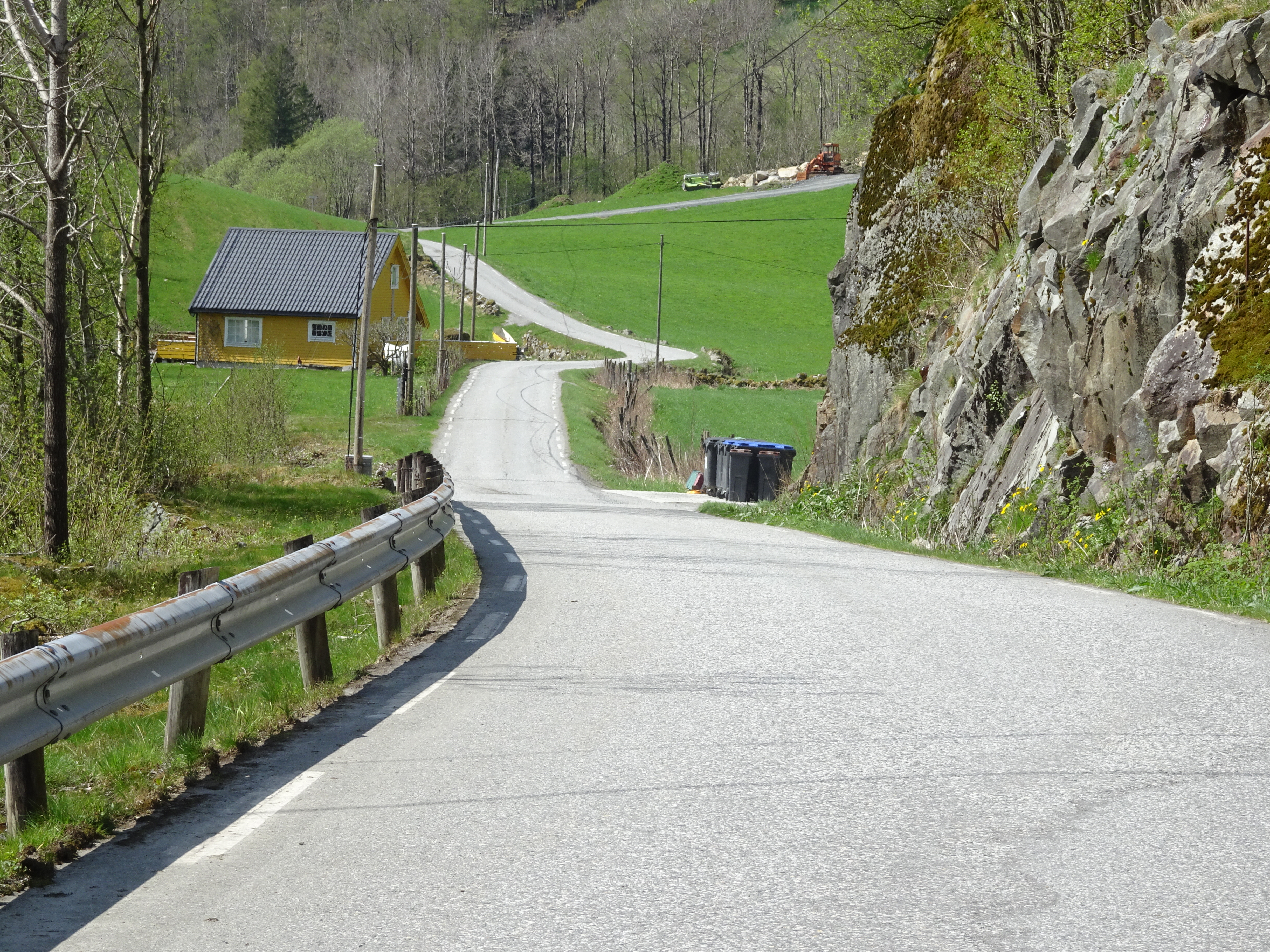 Frettevegen (fylkesvei 39)